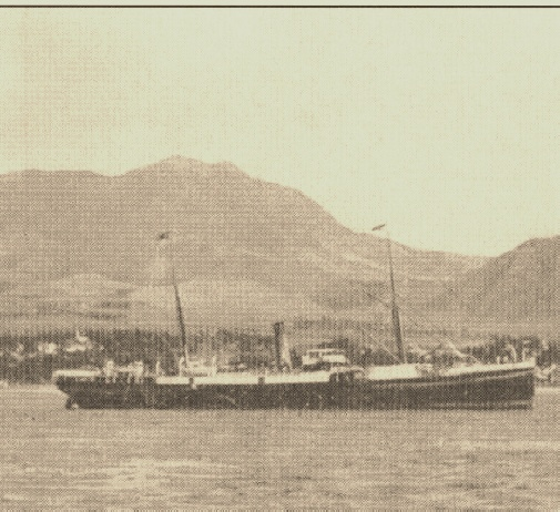 El vapor mixto SS Roraima anclado frente a St. Pierre antes del cataclismo del Monte Pelee en 1902.